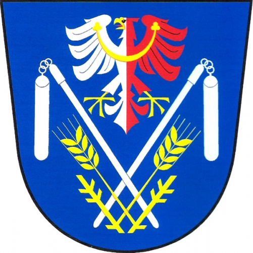 znak, Nové Syrovice, okres Třebíč